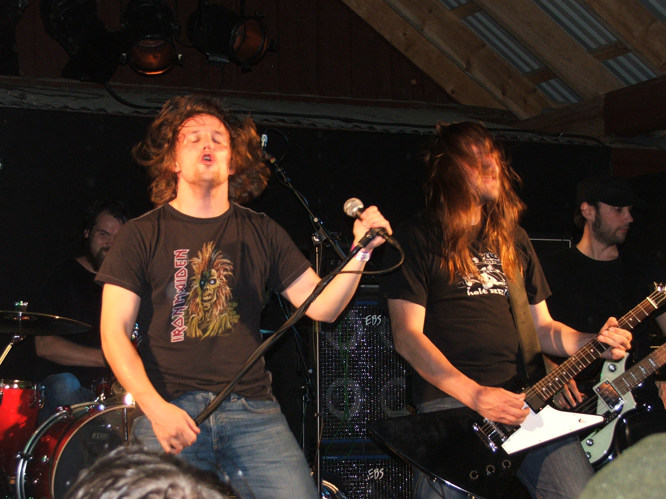 noSvölk på Lutuvalen 2007